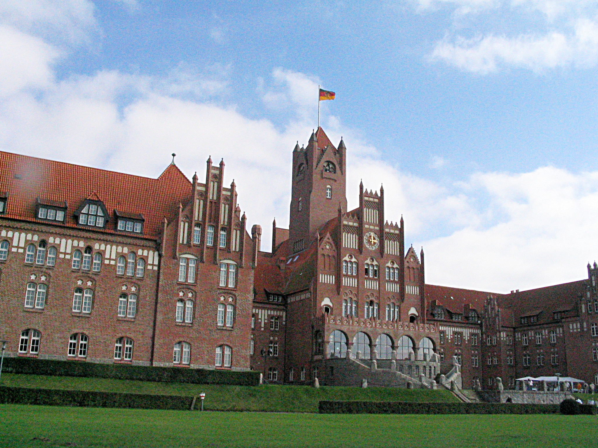 Rote Schloss, MSM zur Wasserseite (Flensburg-Mürwik 2006)